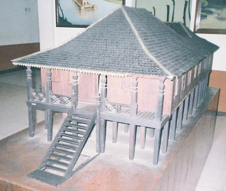 Maket Rumah Balai Bini Tipe 2